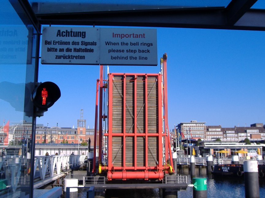 Die geschlossene Hörnbrücke